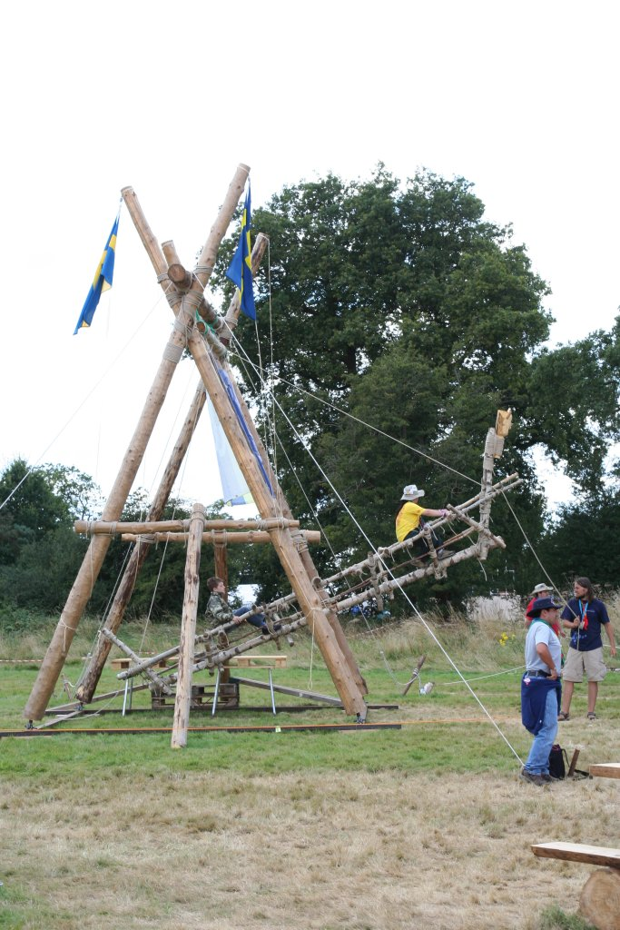 Une des deux constructions des scouts Suédois, qui organisent le prochain jamboree mondial.